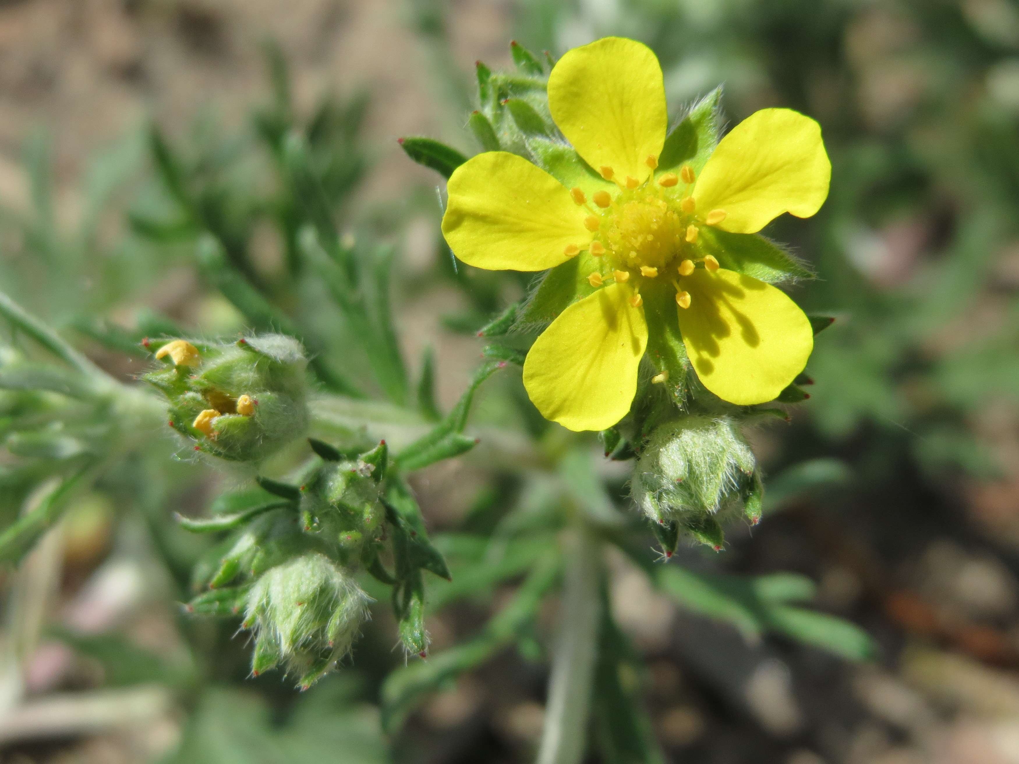 Silber-Fingerkraut (Potentilla argentea) bei Reilingen